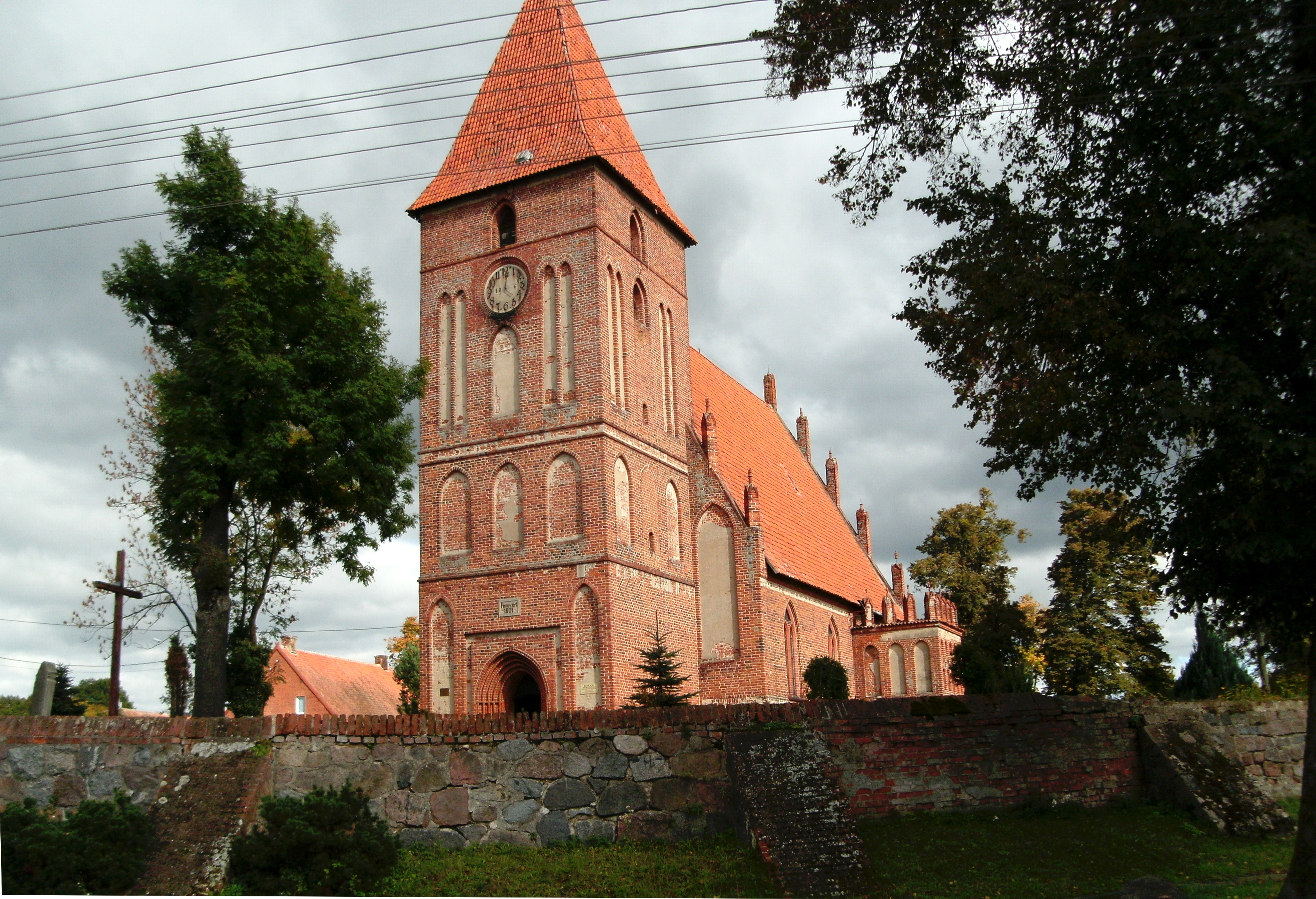 Przezmark - kościół parafialny p.w. Podwyższenia Krzyża, poł. XIV, 1901-2